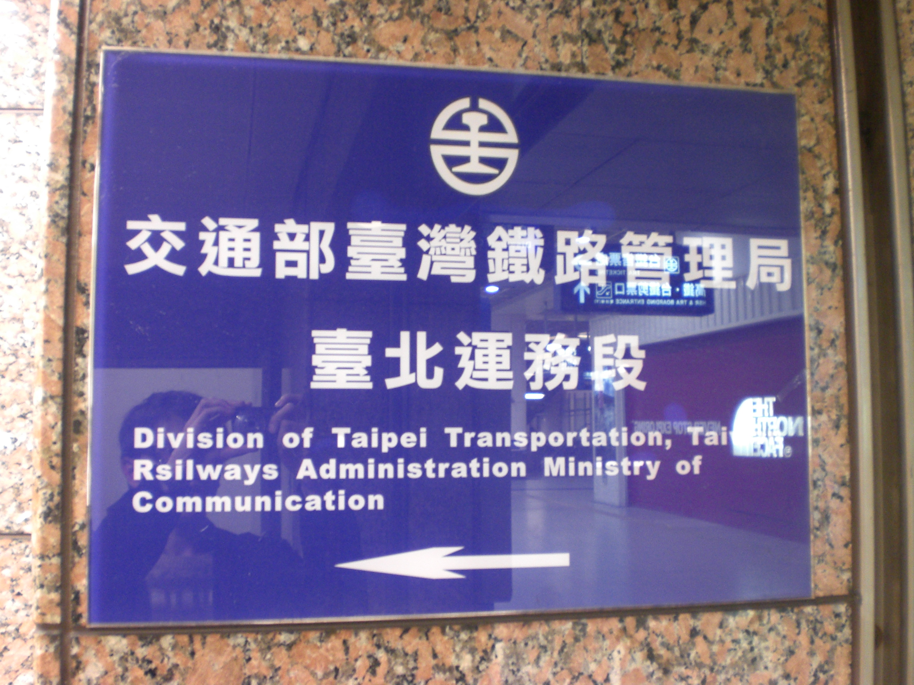 板橋車站大樓1樓大廳固貼的臺灣鐵路管理局臺北運務段標示牌。